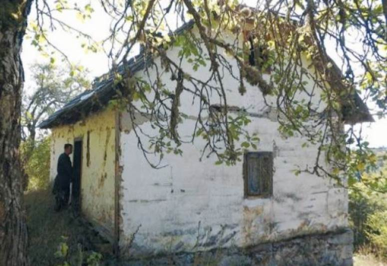 Gornje Dubovo, selo kod Višegrada - zima u selu.